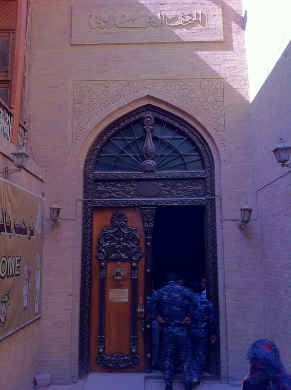 بوابة المتحف البغدادي و هو متحف تراث و فلكلور مدينة بغداد عام 2011